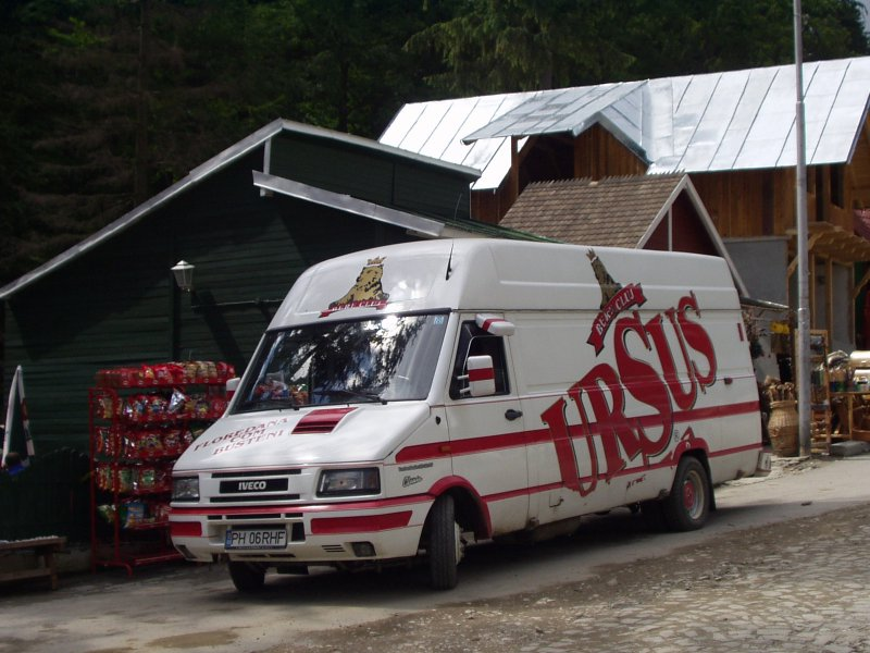 Bere Ursus (Ursus Beer) Truck in Romania